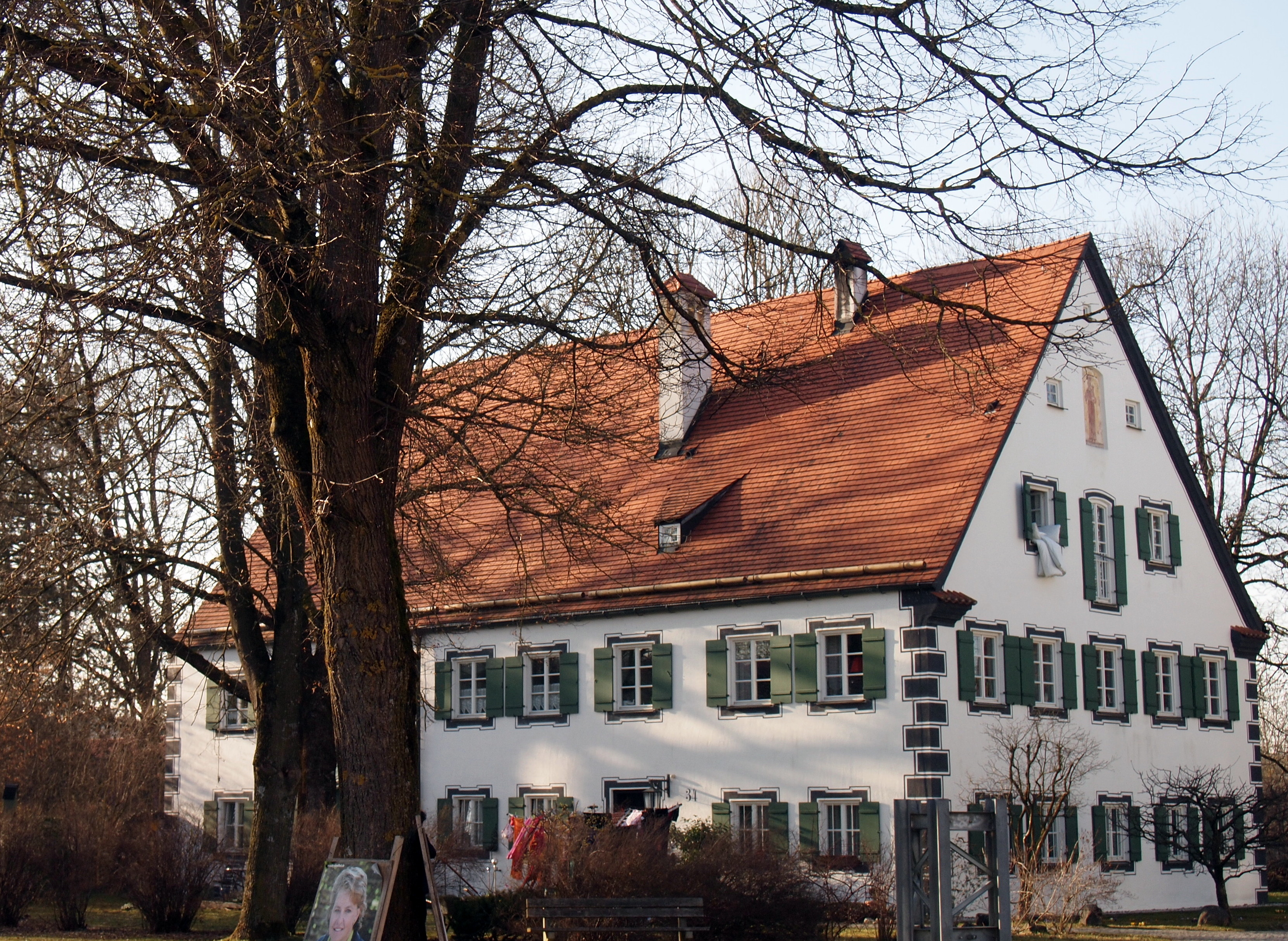 Hauptstraße 34, Erpfting, Stadt Landsberg am Lech.